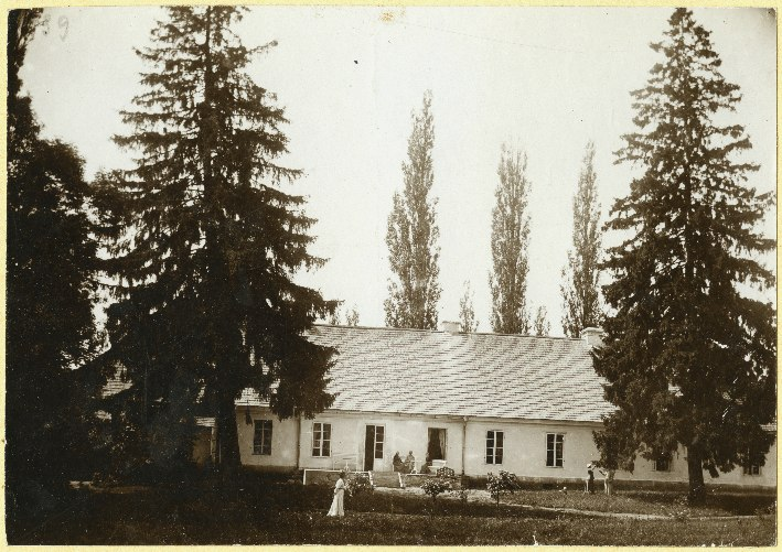 Гарнастаевічы. СядзібаБеларуская (тарашкевіца): Гарнастаевічы (Harnastajevičy). Сядзіба